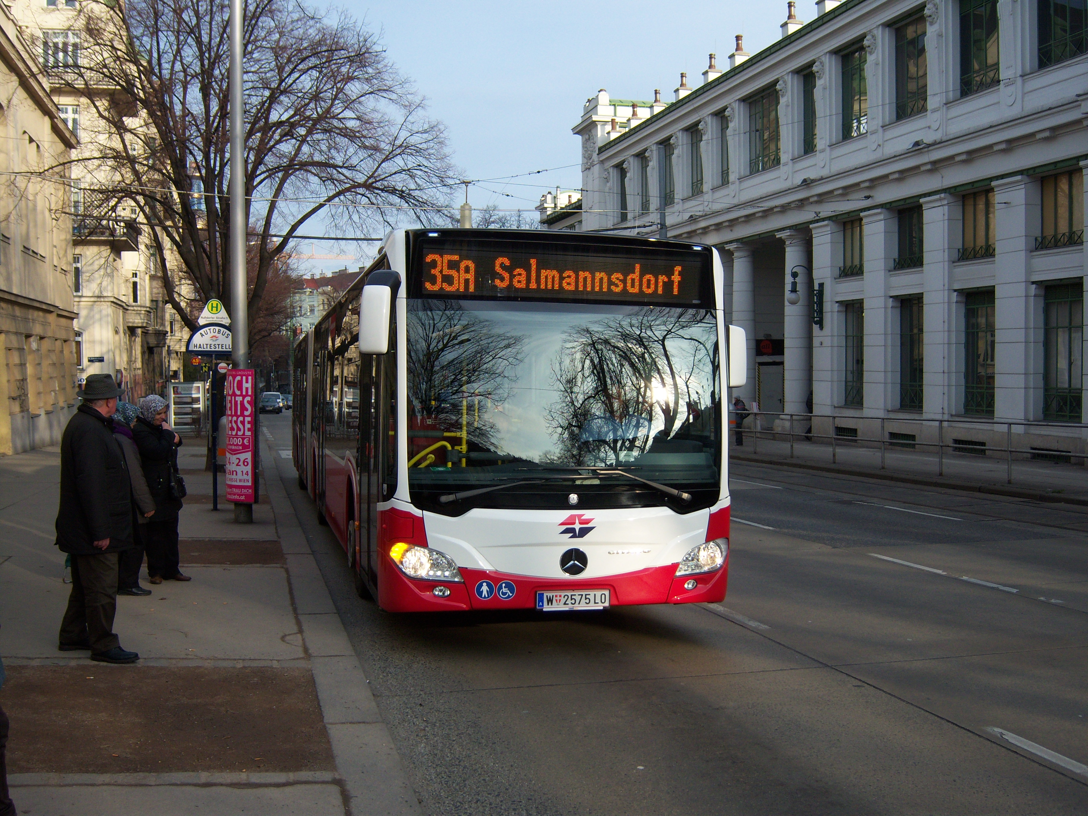 Ein Mercedes-Benz Citaro II Euro 6-Gelenksbus in der Haltestelle Nußdorfer Straße im Einsatz auf der Linie 35A